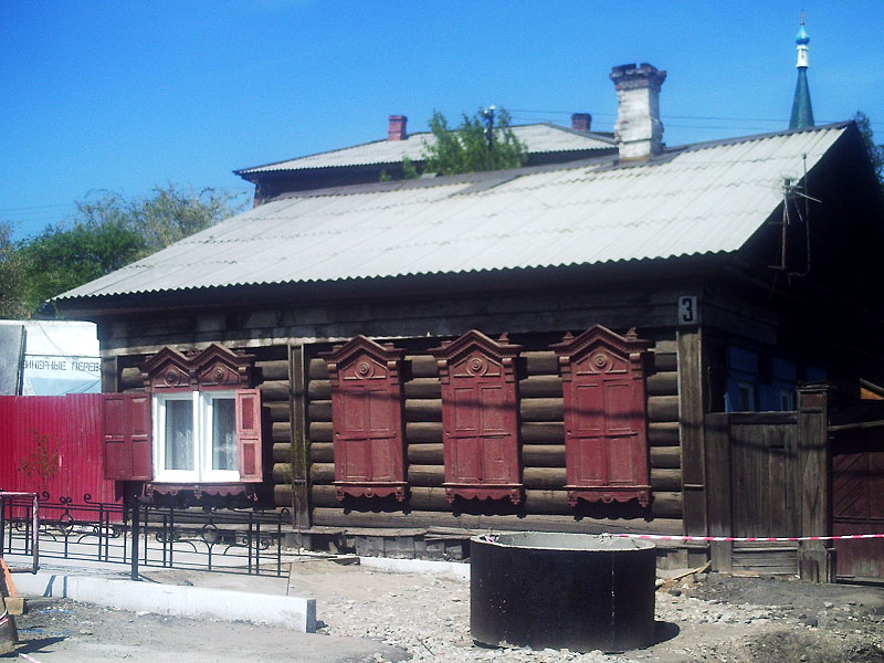 Деревянный дом в 130 квартале Иркутска (улица 3-го Июля)